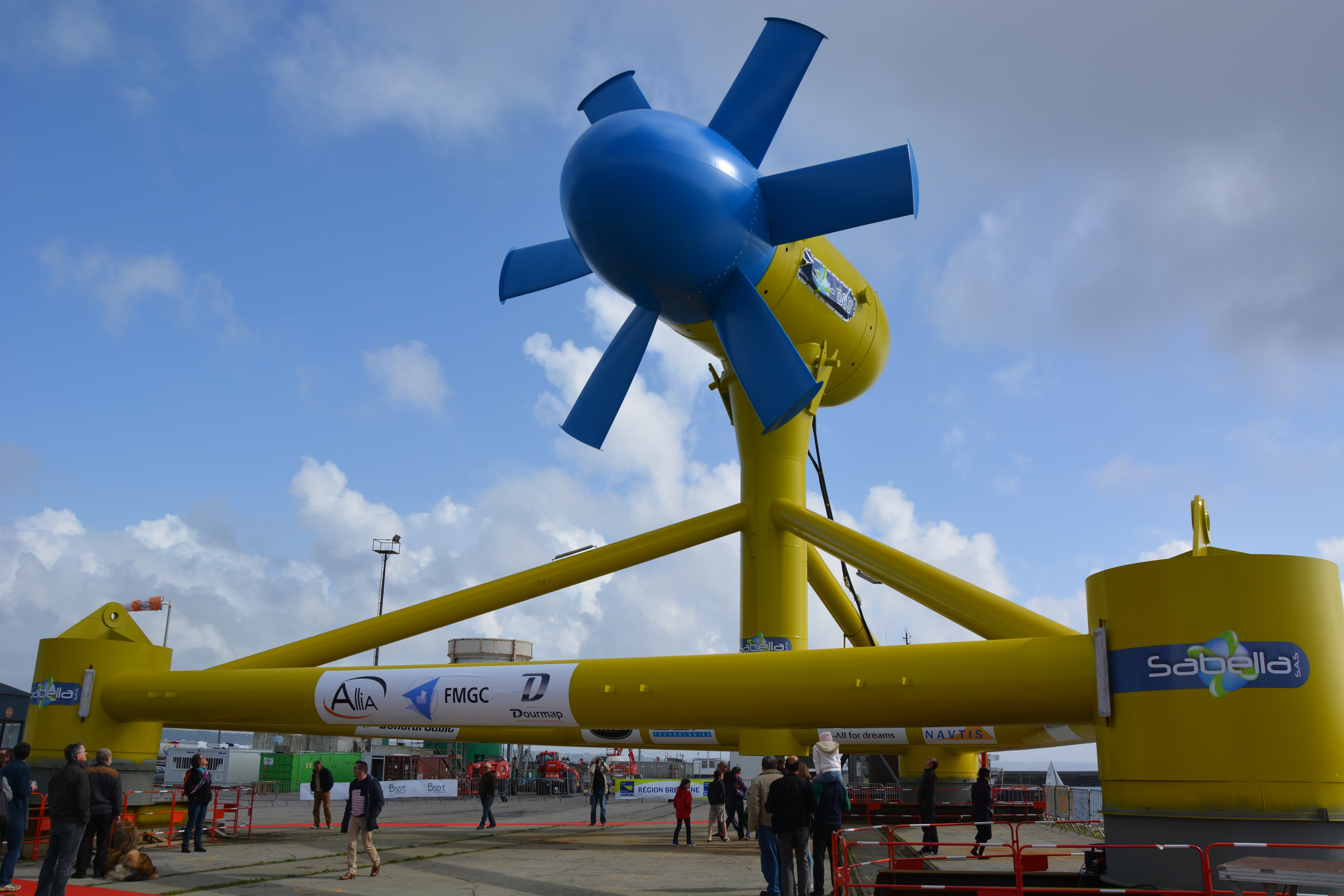 Démonstrateur hydrolienne Sabella D10 à Brest lors des portes ouvertes